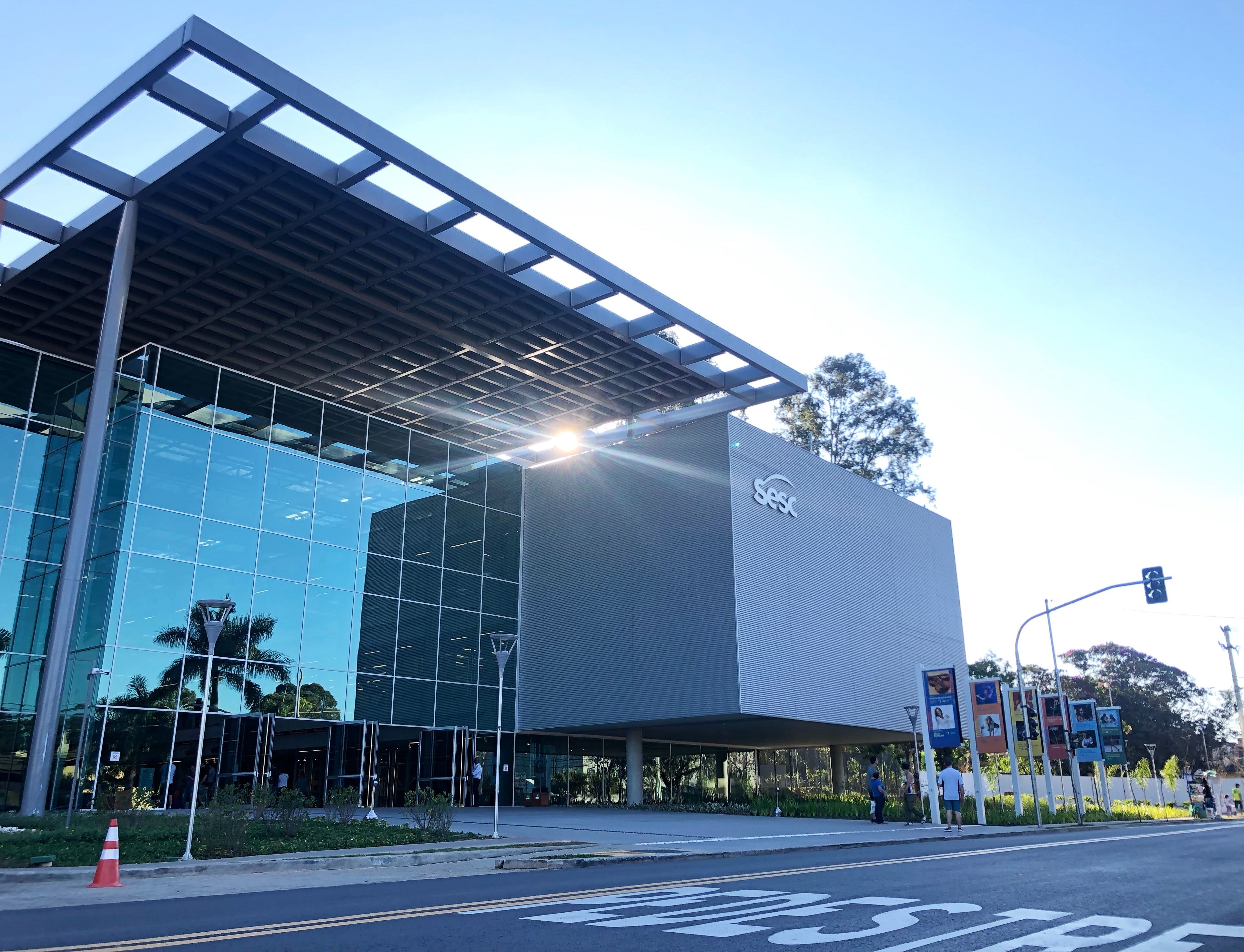 SESC Guarulhos, durante maratona de fotografia, em junho de 2019.